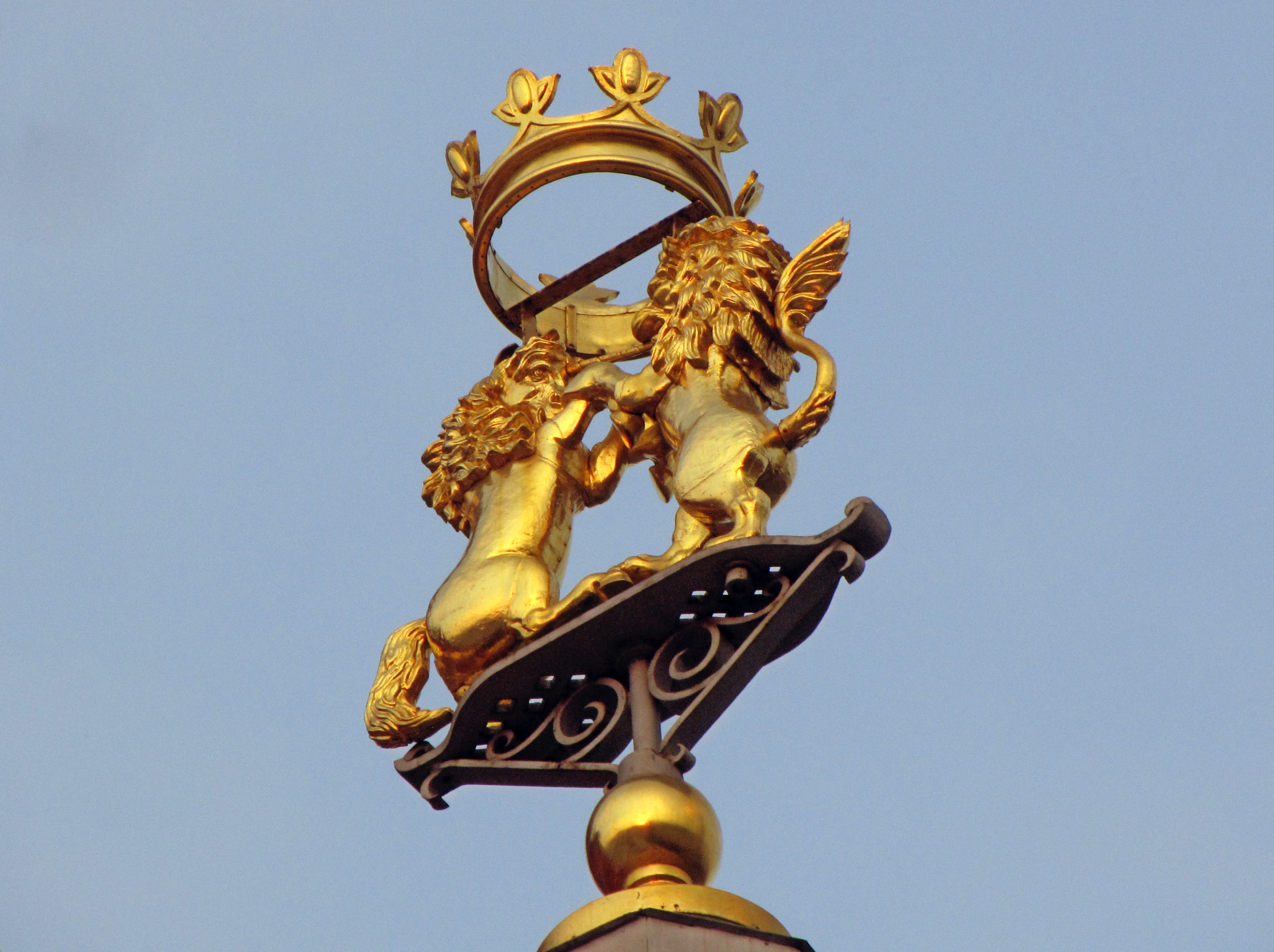 Исторический музей